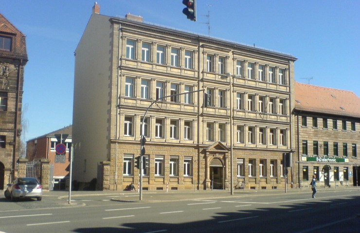 Das Heinrich-Schliemann-Gymnasium in Fürth im April 2007